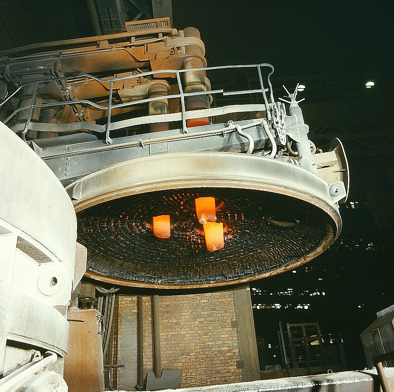 Original image description from the Deutsche Fotothek Metallurge für Hüttentechnik